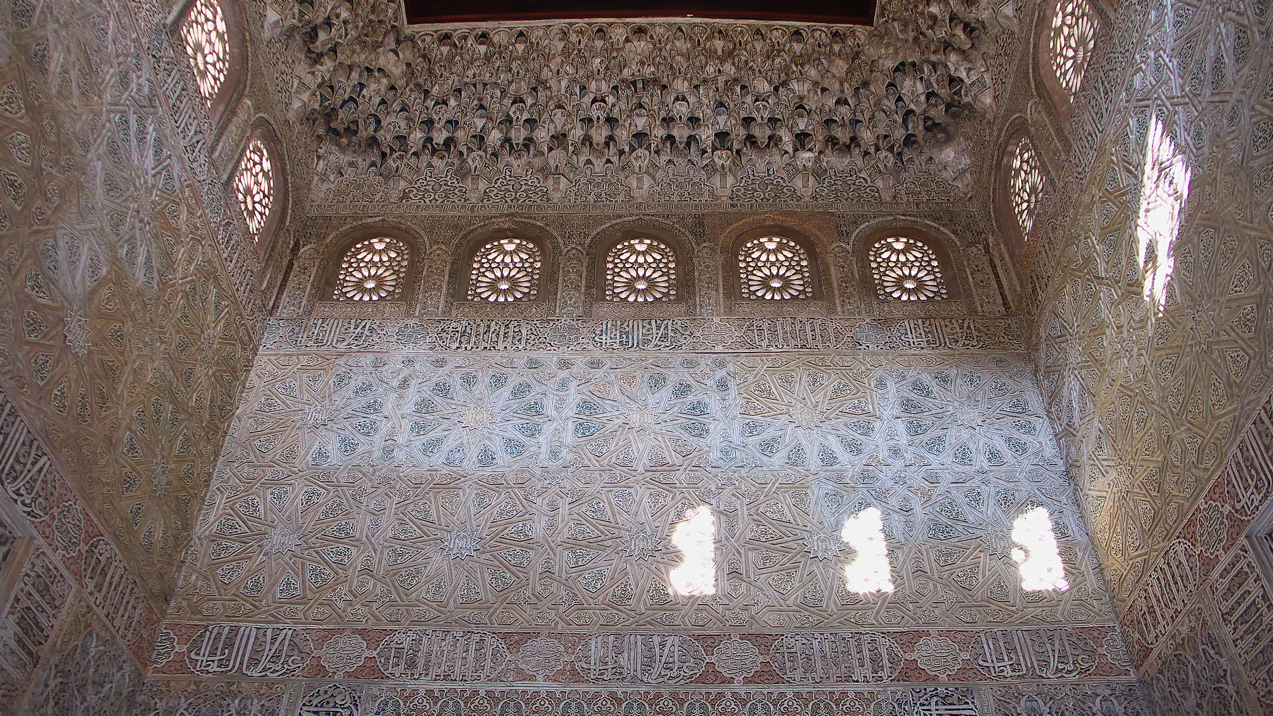 Mandado a construir por el gobernador almohade de Granada, Ishaq ben Yusuf (1228). El sultán nazarí Yusuf I (1333-1354) lo restauró posteriormente.